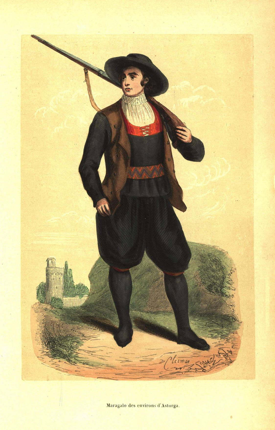 Maragato de los alrededores de Astorga.